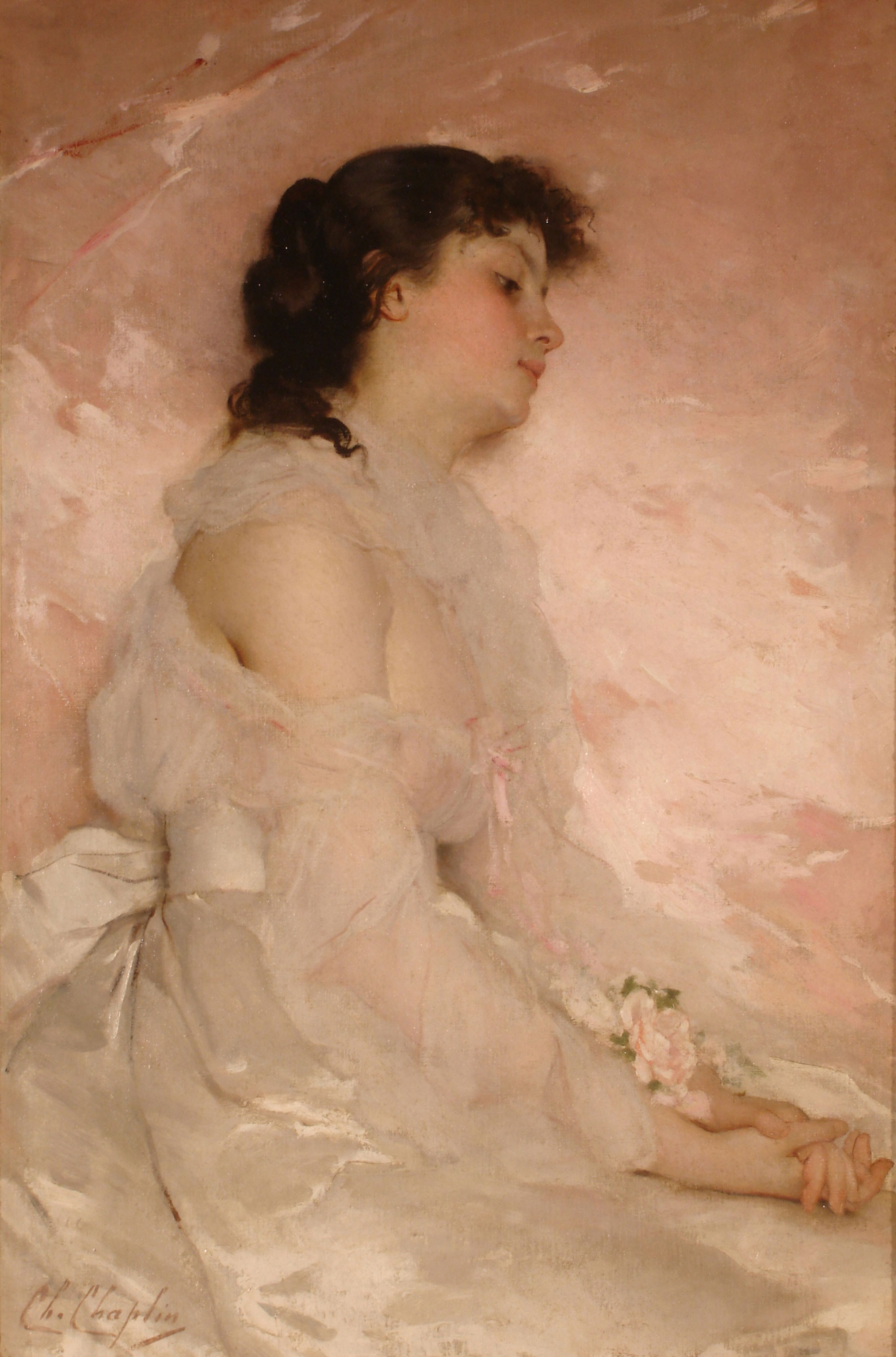 (Ensueño).